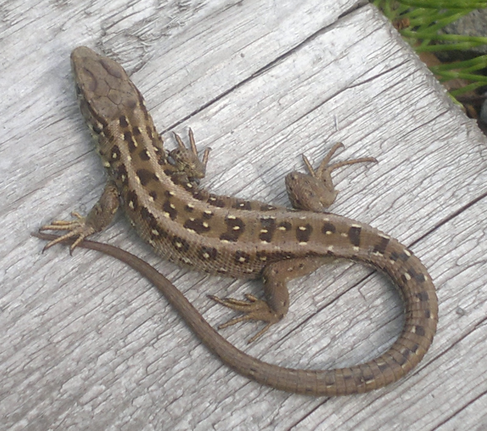 Archeopark Chotěbuz-Podobora (Cz)